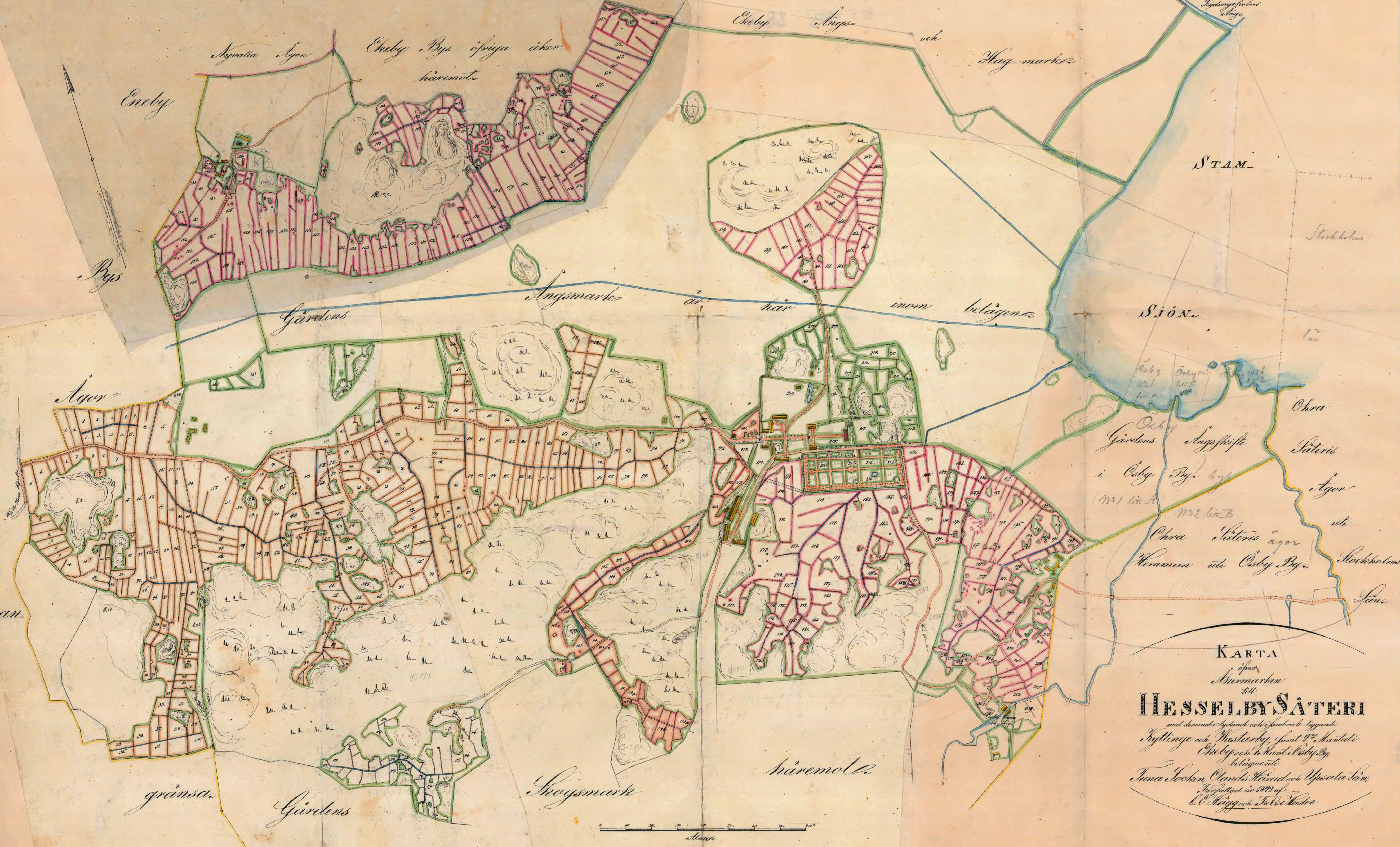 Karta över Hässelby säteris ägor